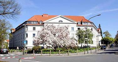 Institut für Musik Ansicht Caprivistraße